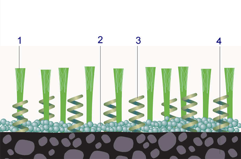 Kunstrasen